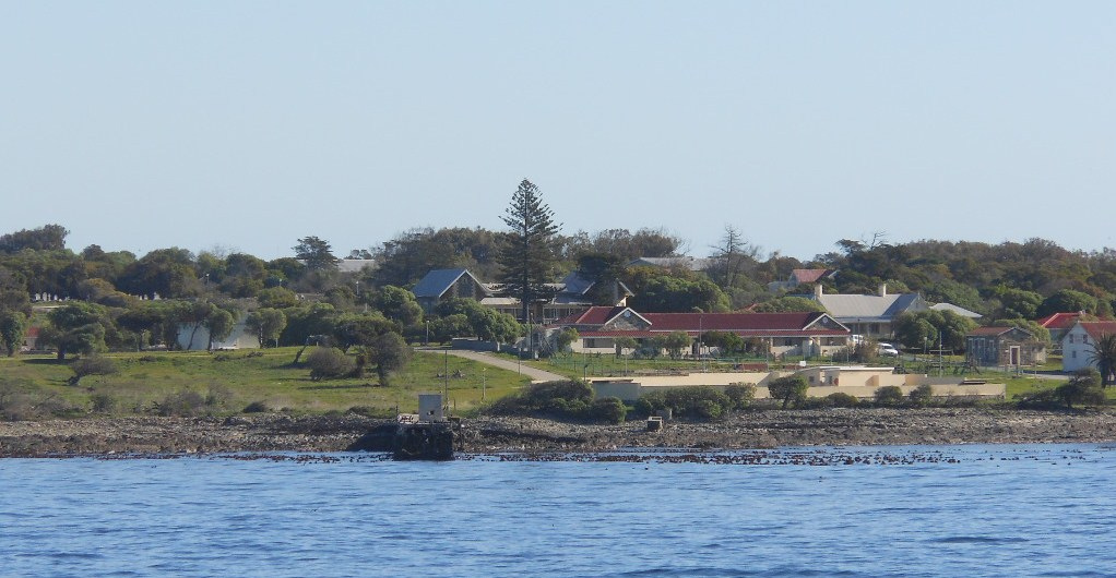 Robben Island Village